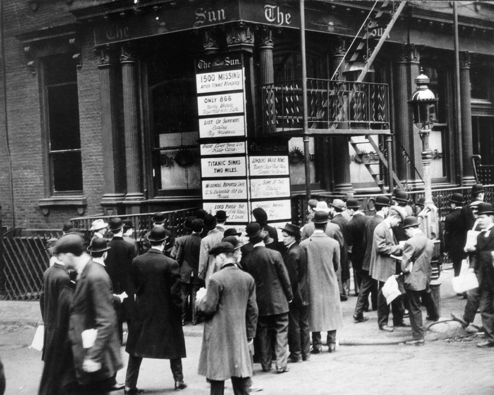 На улице в Нью-Йорке вывешивают последние новости о количестве выживших и погибших.